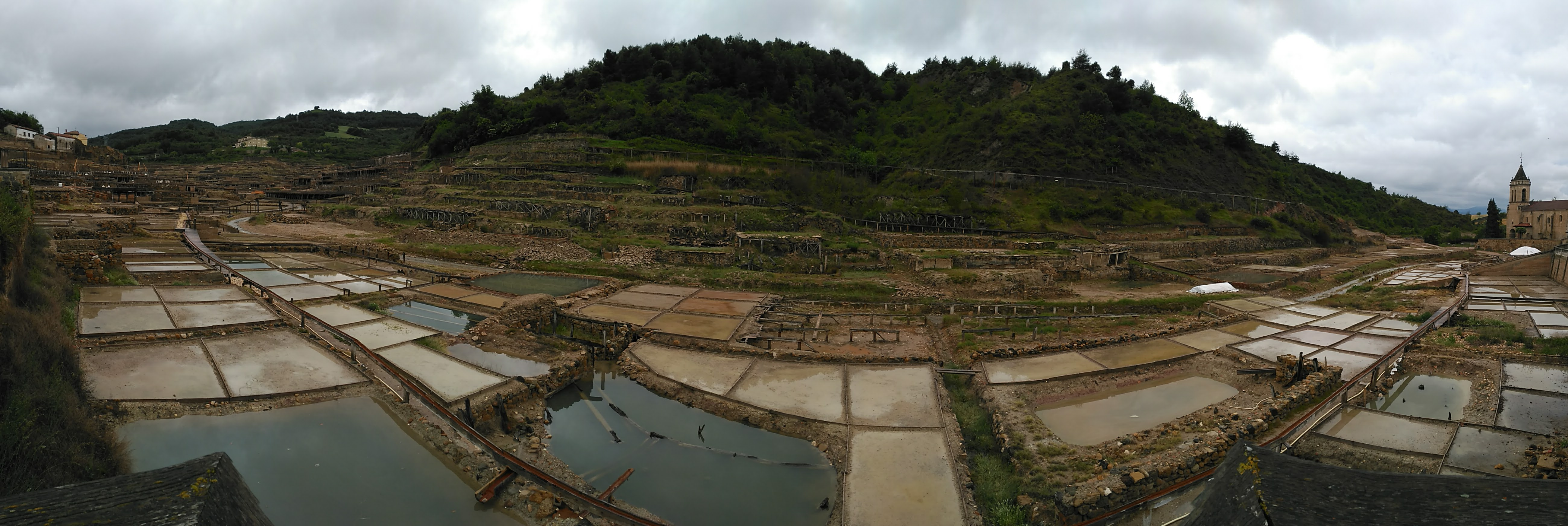 Añanako Gatz Harana